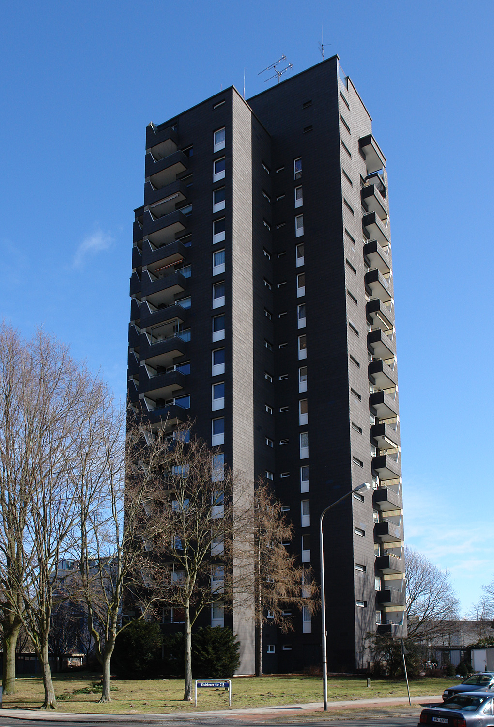 Bremen-Vahr: Hochhaus Eislebener Str. 31, „Großer Kurfürst (Kurfürst-Tower)“